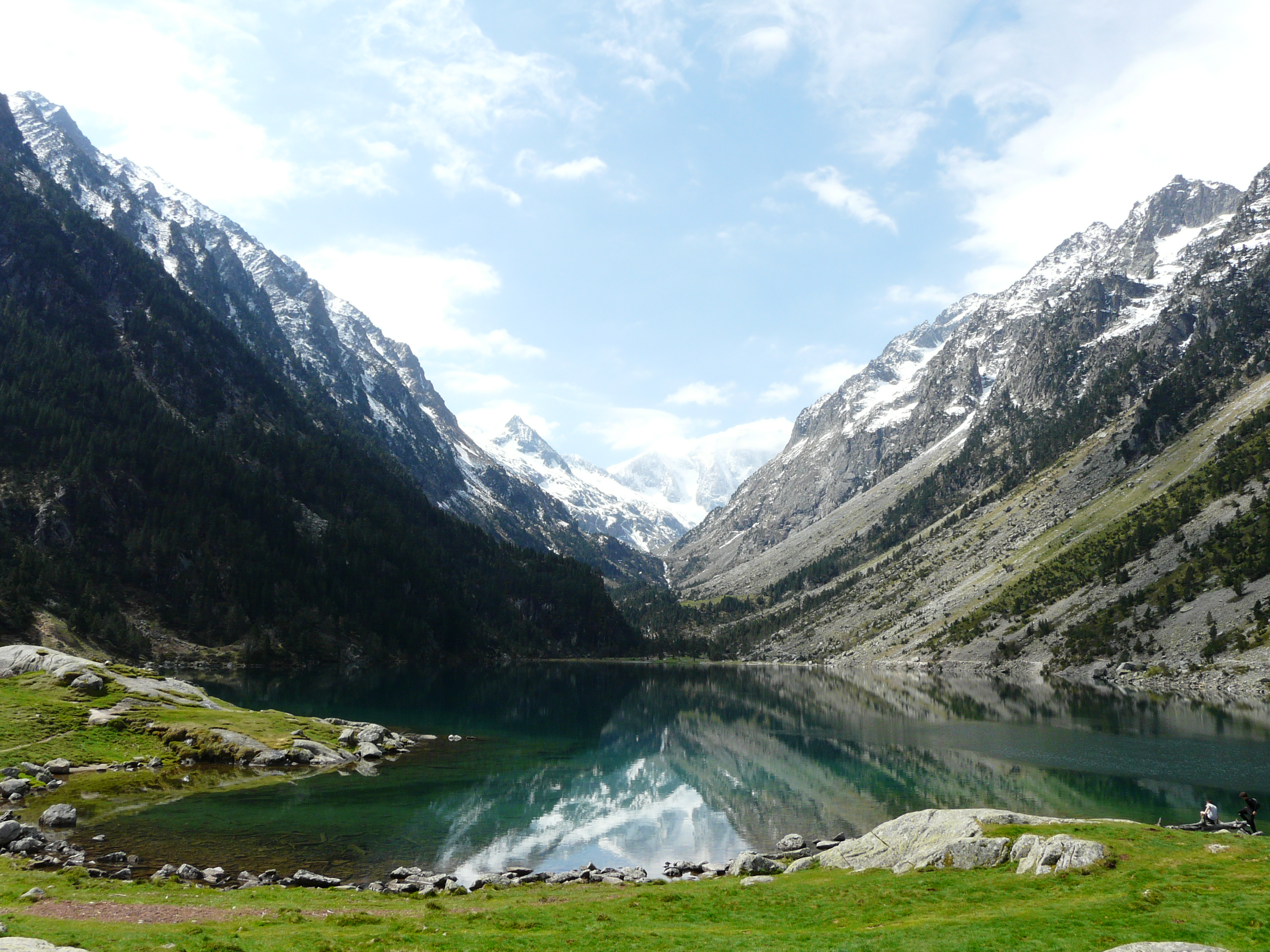 Le lac de Gaube, Cauterets, Hautes-Pyrénées, France. Vue prise en direction du sud.